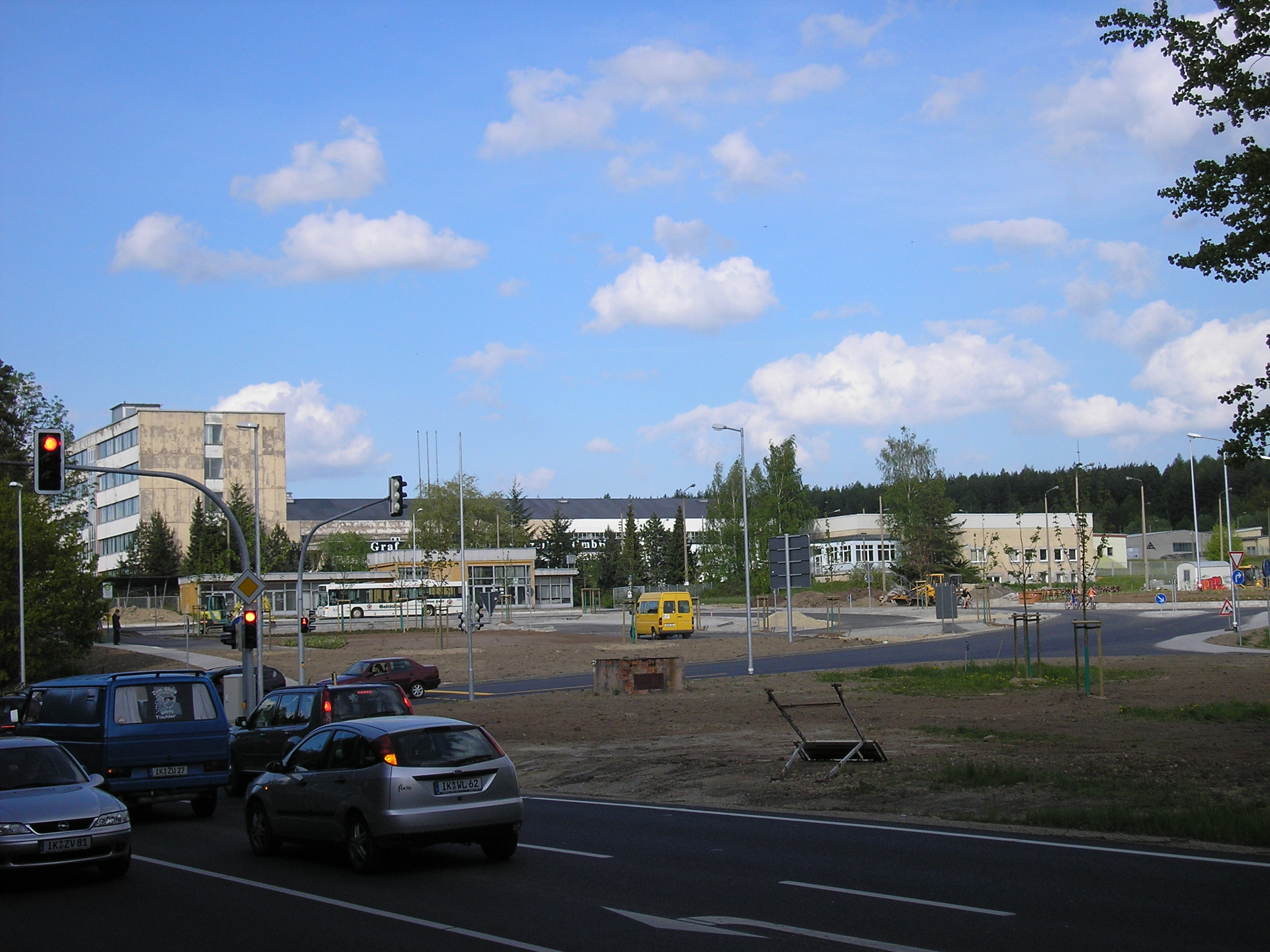 Gesamtansicht des Porzellanwerks Henneberg in Ilmenau (Thüringen).